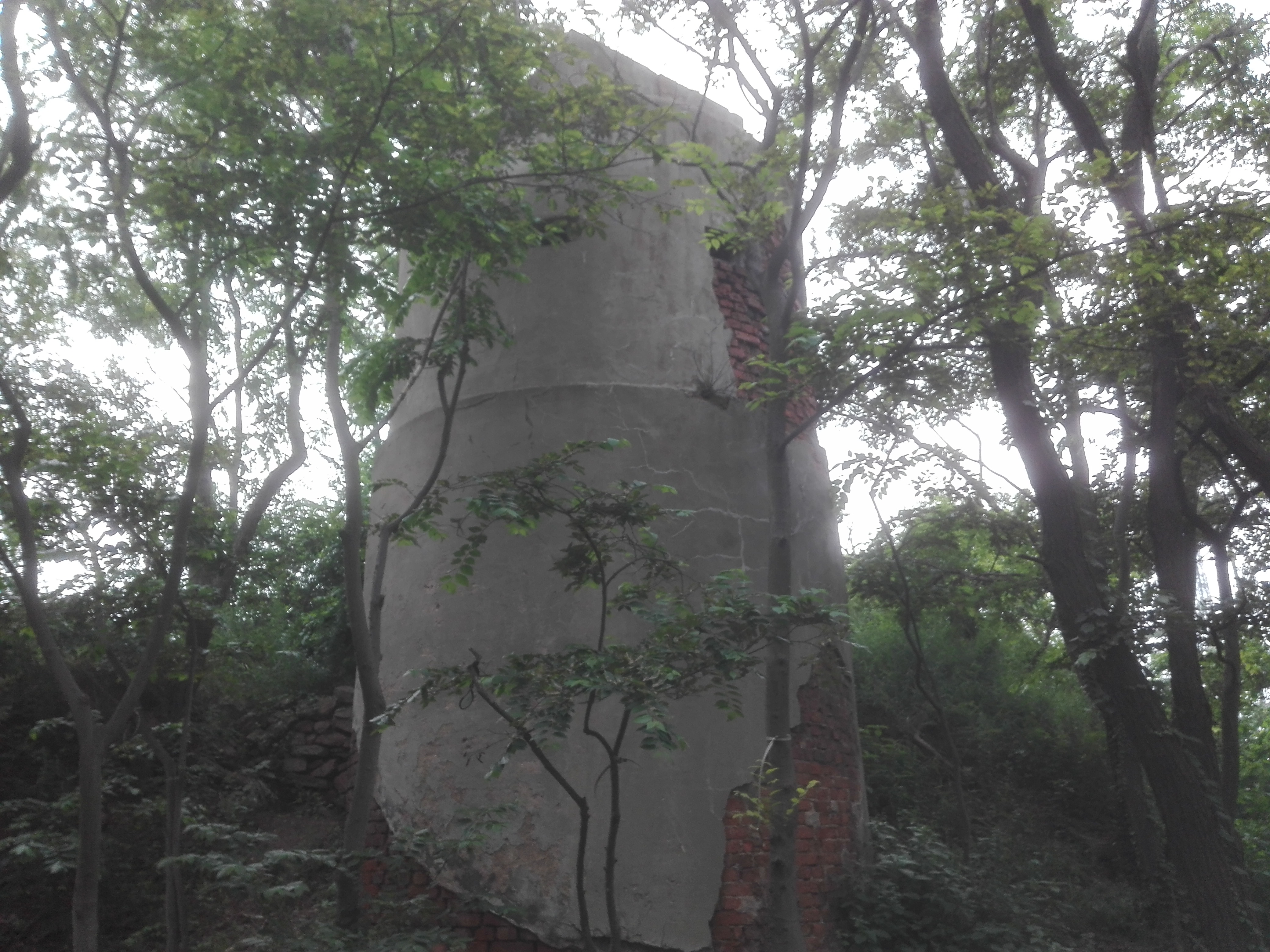 台西镇炮台遗迹